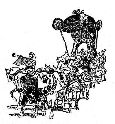 Le Char de Lucie Le Péru, Reine des Reines de la Mi-Carême 1902 pour la rive gauche.